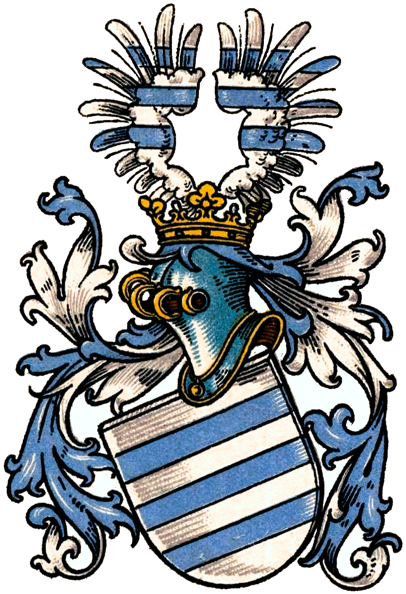 Wappen der von Heyden (Westfalen)